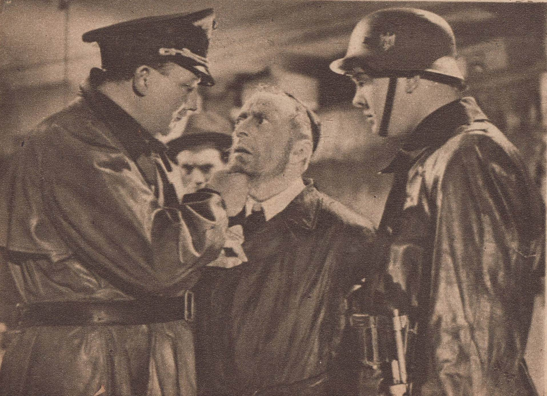 Kręcenie filmu Ulica Graniczna: Władysław Godik jako krawiec Liberman